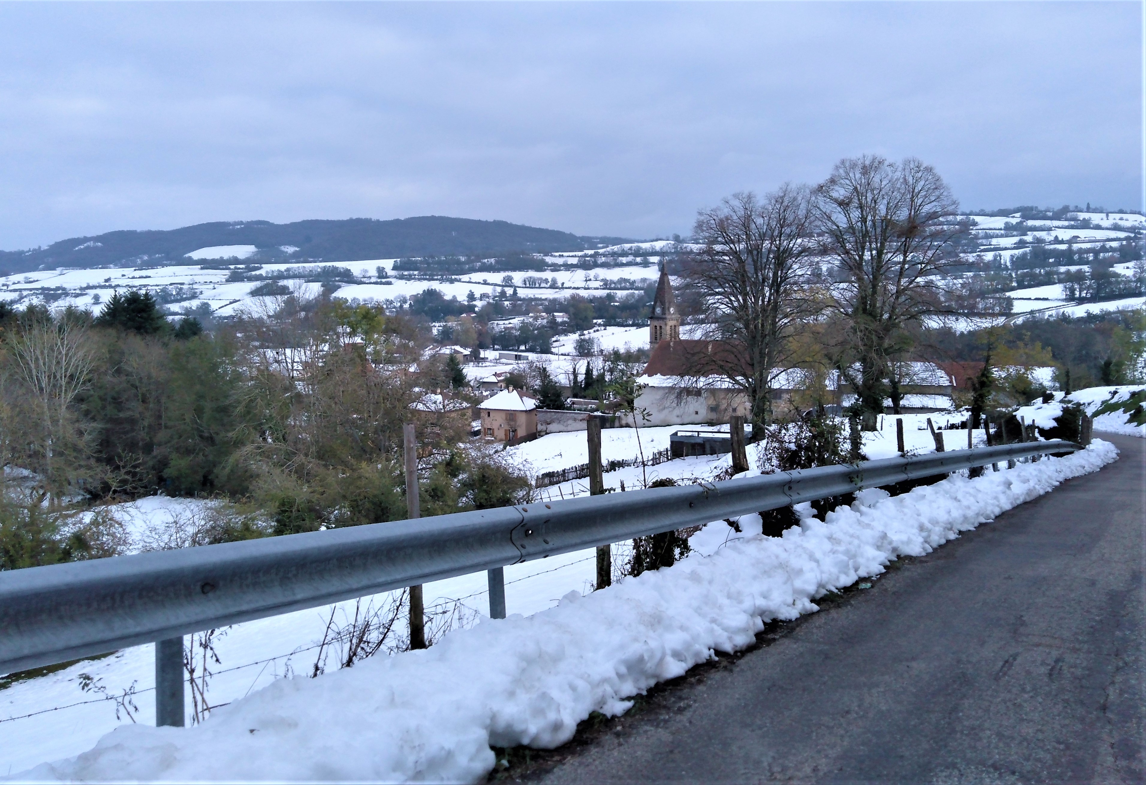 Terres Froides